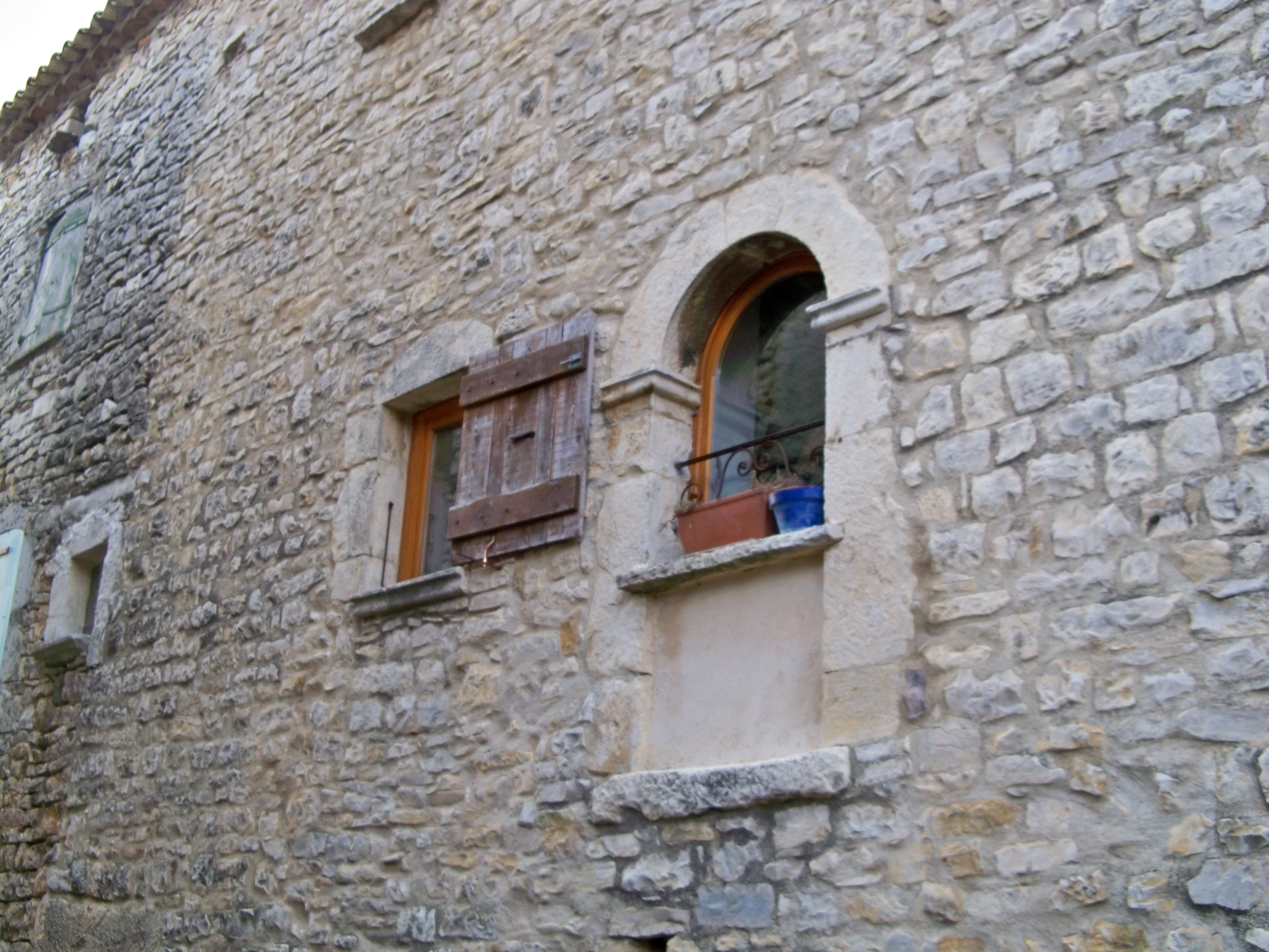 Ancienne entrée couverte d'un arc tiercé en plein cintre, transformée en fenêtre à l'Hospitalet (04)